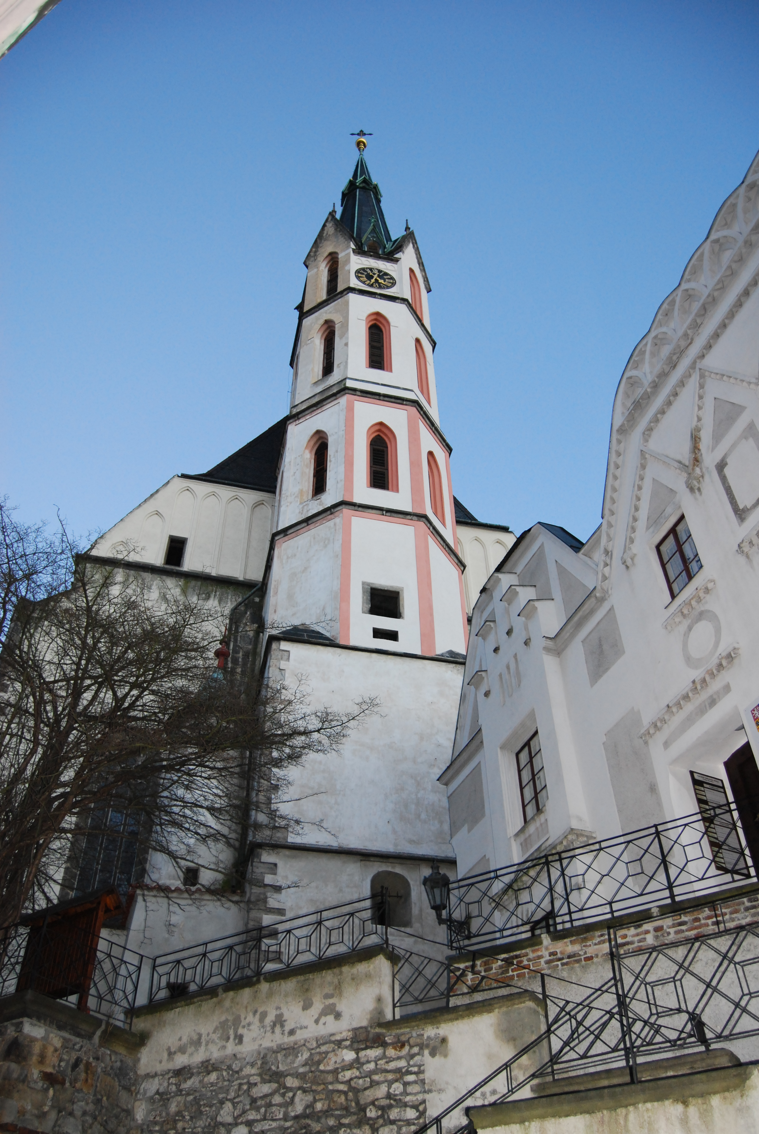 Český Krumlov. Okres Český Krumlov. Česko.